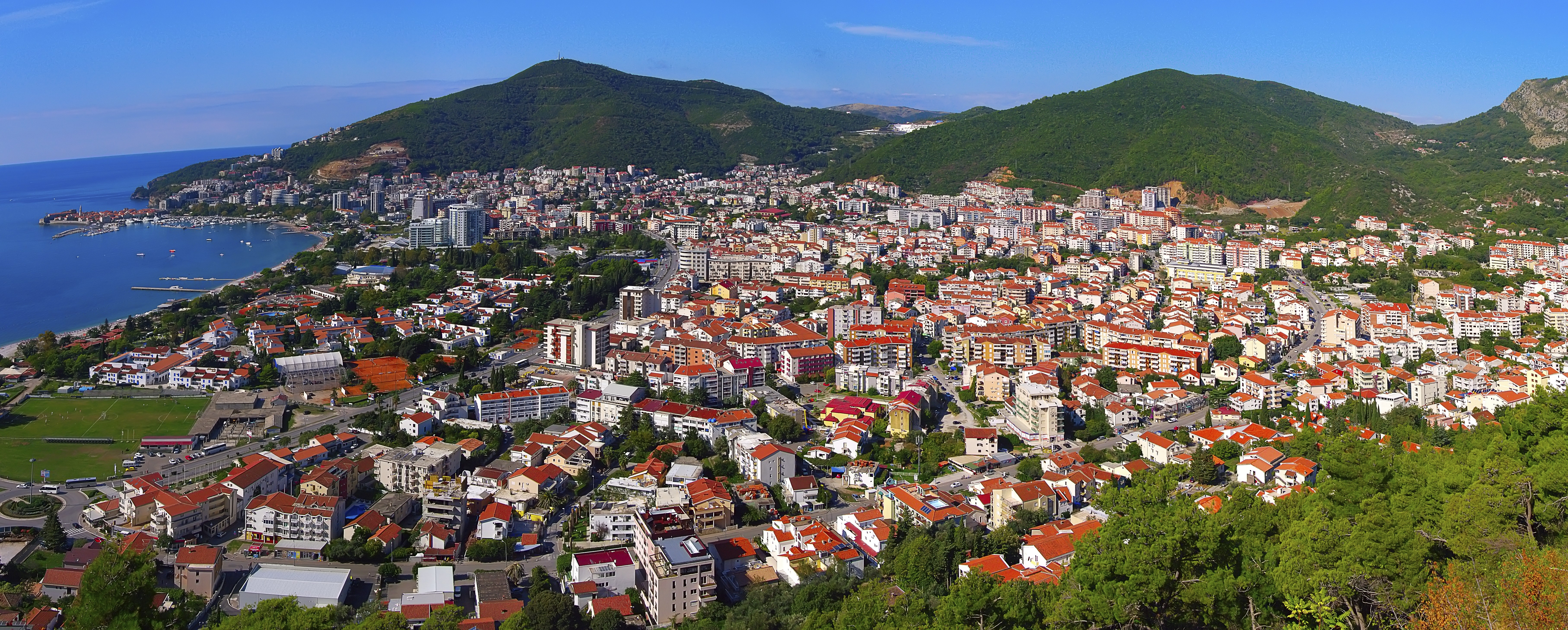 Budva. Montenegro - Черногория